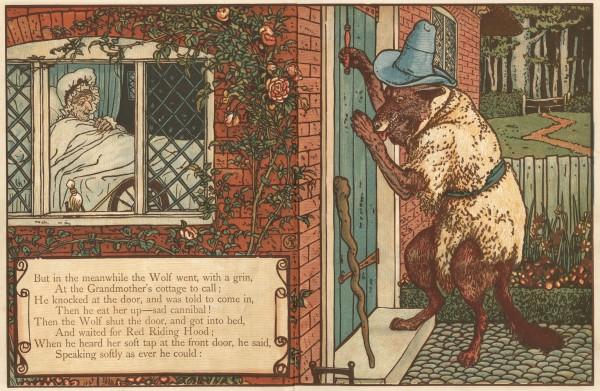 Гравюры по рисункам Крейна к сказкам «Синяя Борода», «Спящая Красавица», «Красная Шапочка», «Джек и бобовый стебель»